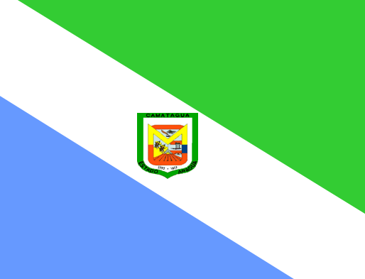 Bandera del municipio Camatagua. Estado Aragua. Venezuela